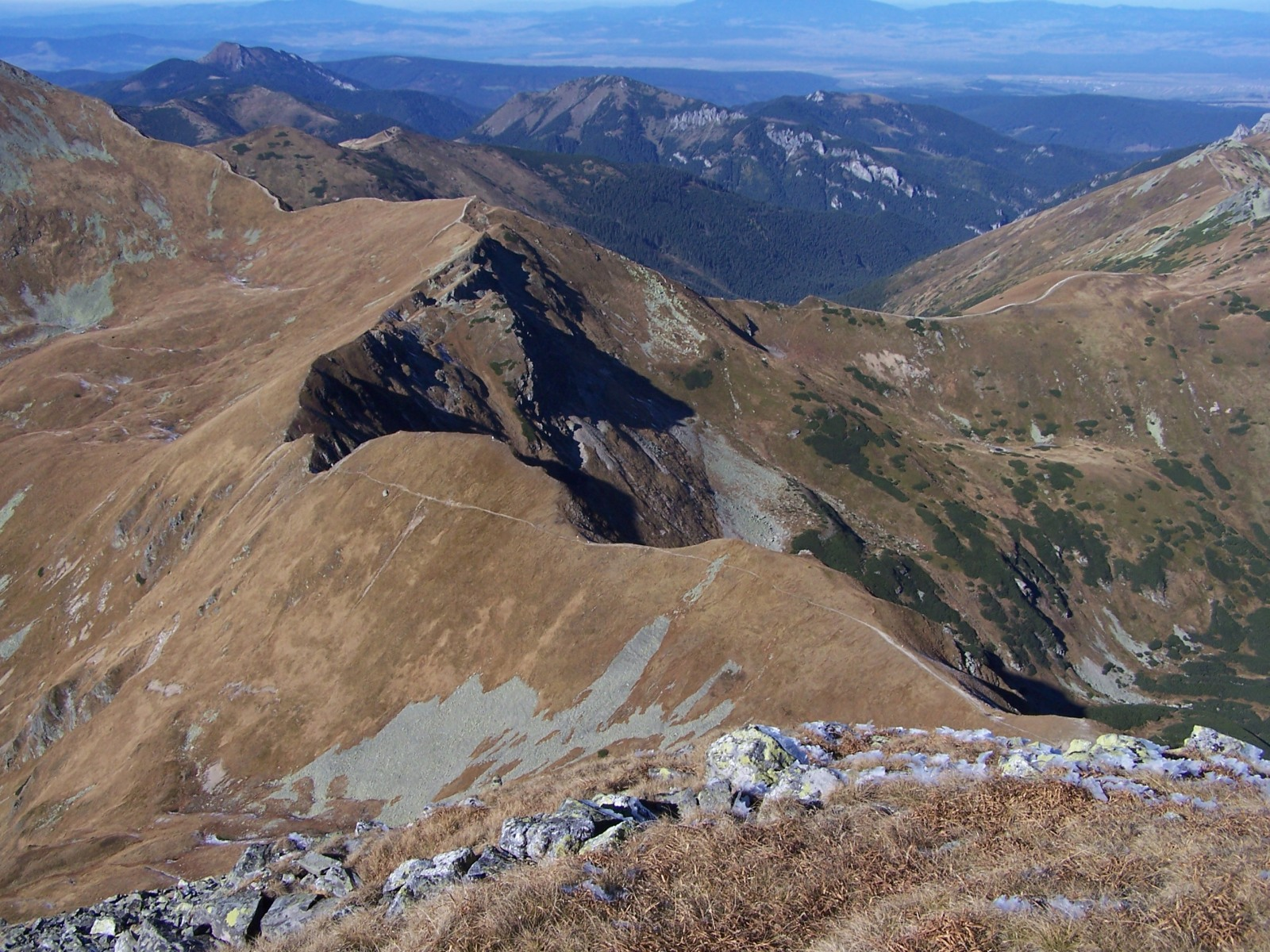 Widok z Błyszcza w Tatrach. W dole Liliowe Turnie, Siwy Zwornik. W głębi Trzydniowiański Wierch, Osobita i Bobrowiec